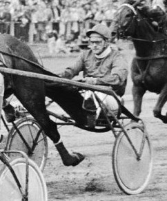 Grote Prijs der Lage Landen op Duindigt te Wassenaar. (...) tweede de Fransman Leopold Verroken met Eléazar (9)